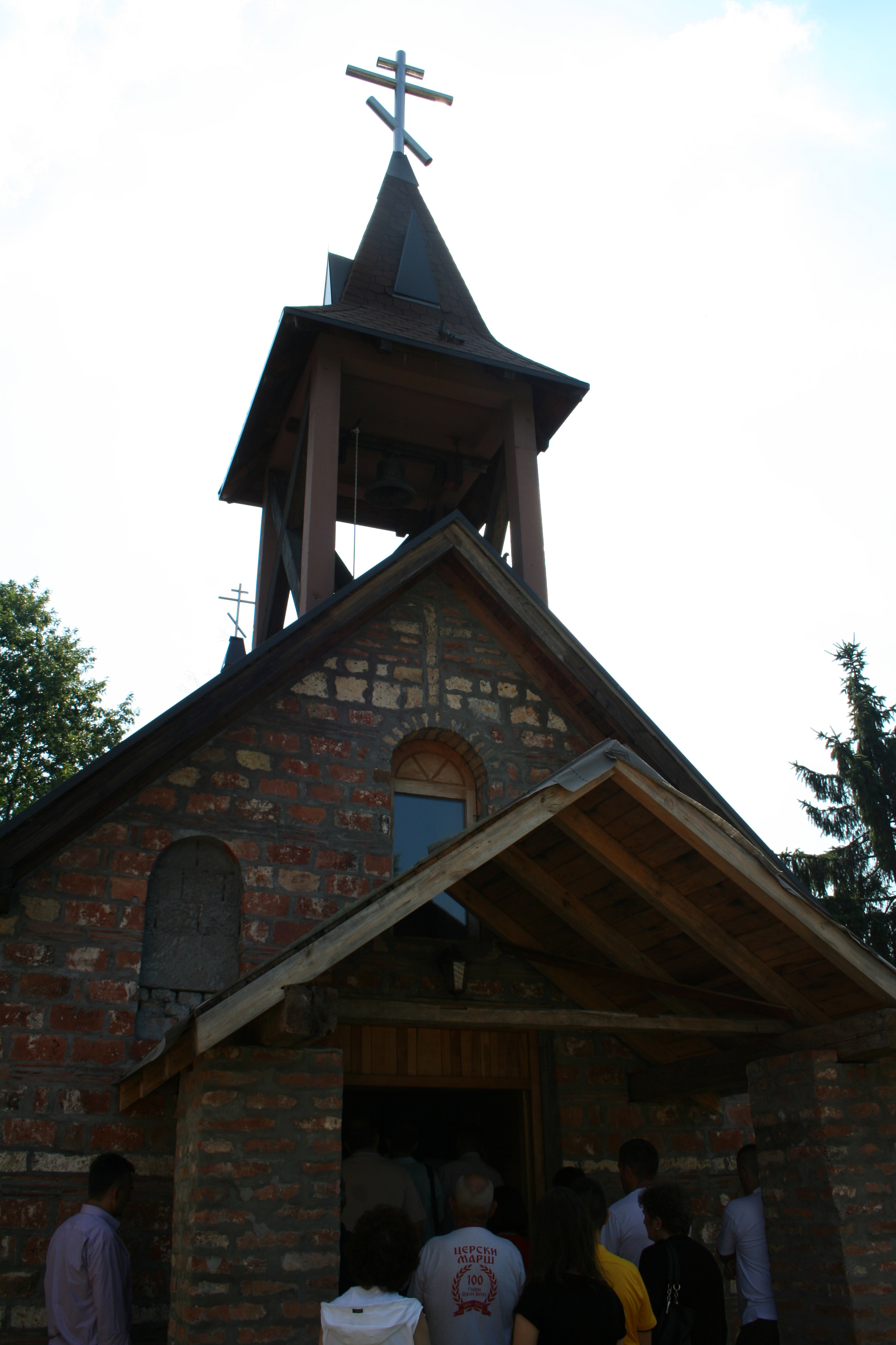 Crkva Svetog Jovana Šangajskog, Lipove vode, Cer